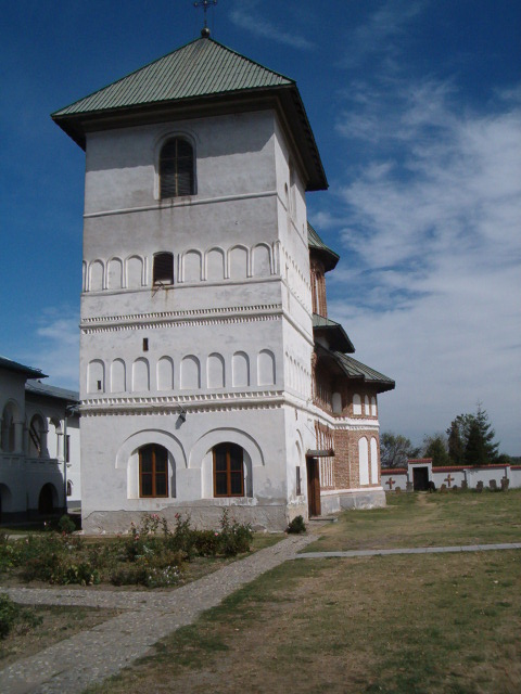 Biserica manastirii 04